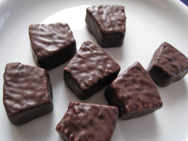 Baumkuchenspitzen, German product from Kassel (northern Hesse)